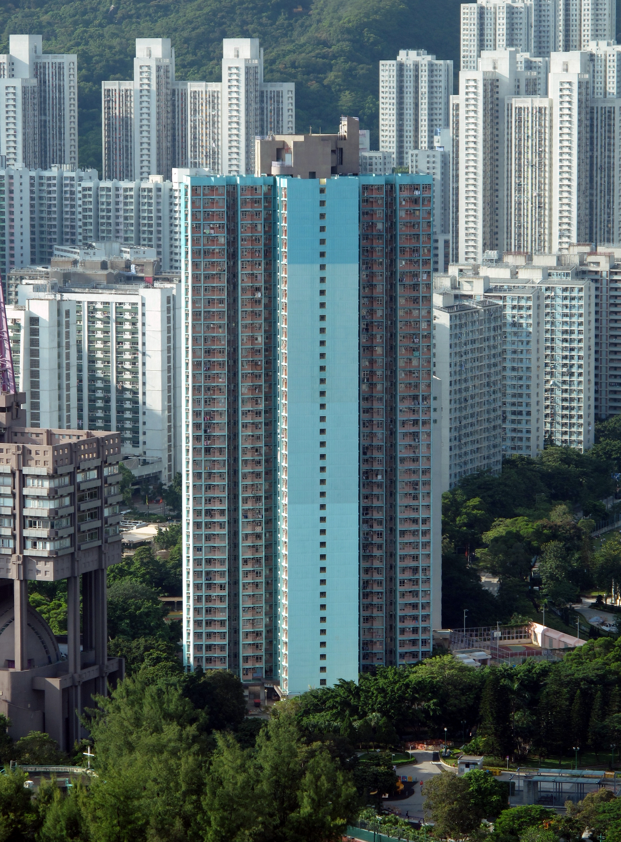 Hong Keung Court